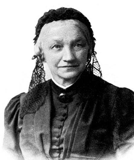 Foto entnommen: Kurt Schroecke: Louise Fröbel. Fröbels zweite Gattin, Blankenburg 1912